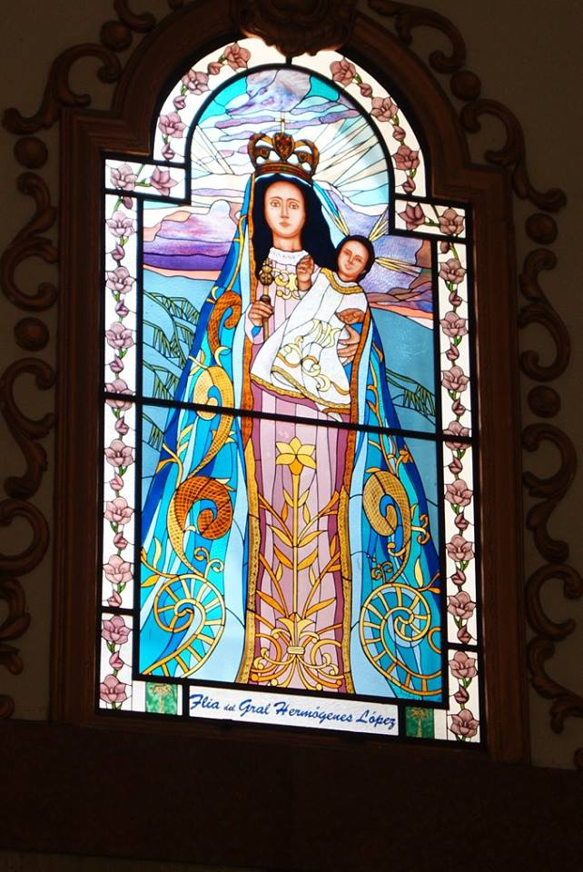 fotografia